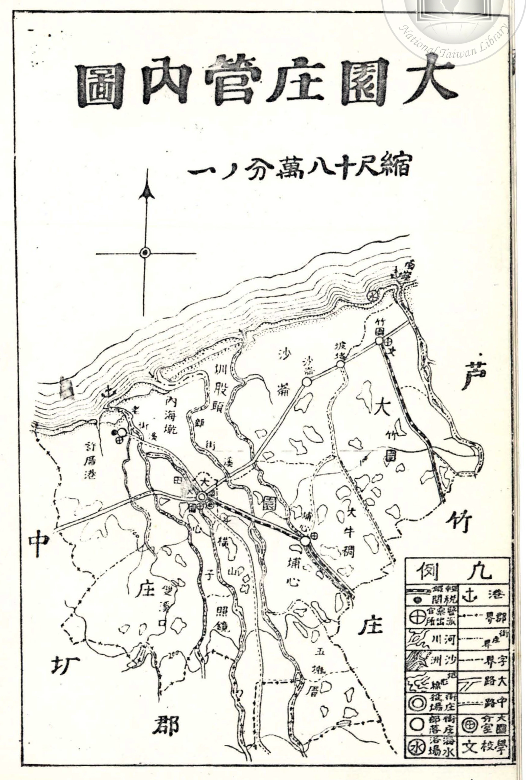 中文（台灣）: 新竹州桃園郡大園庄管內圖